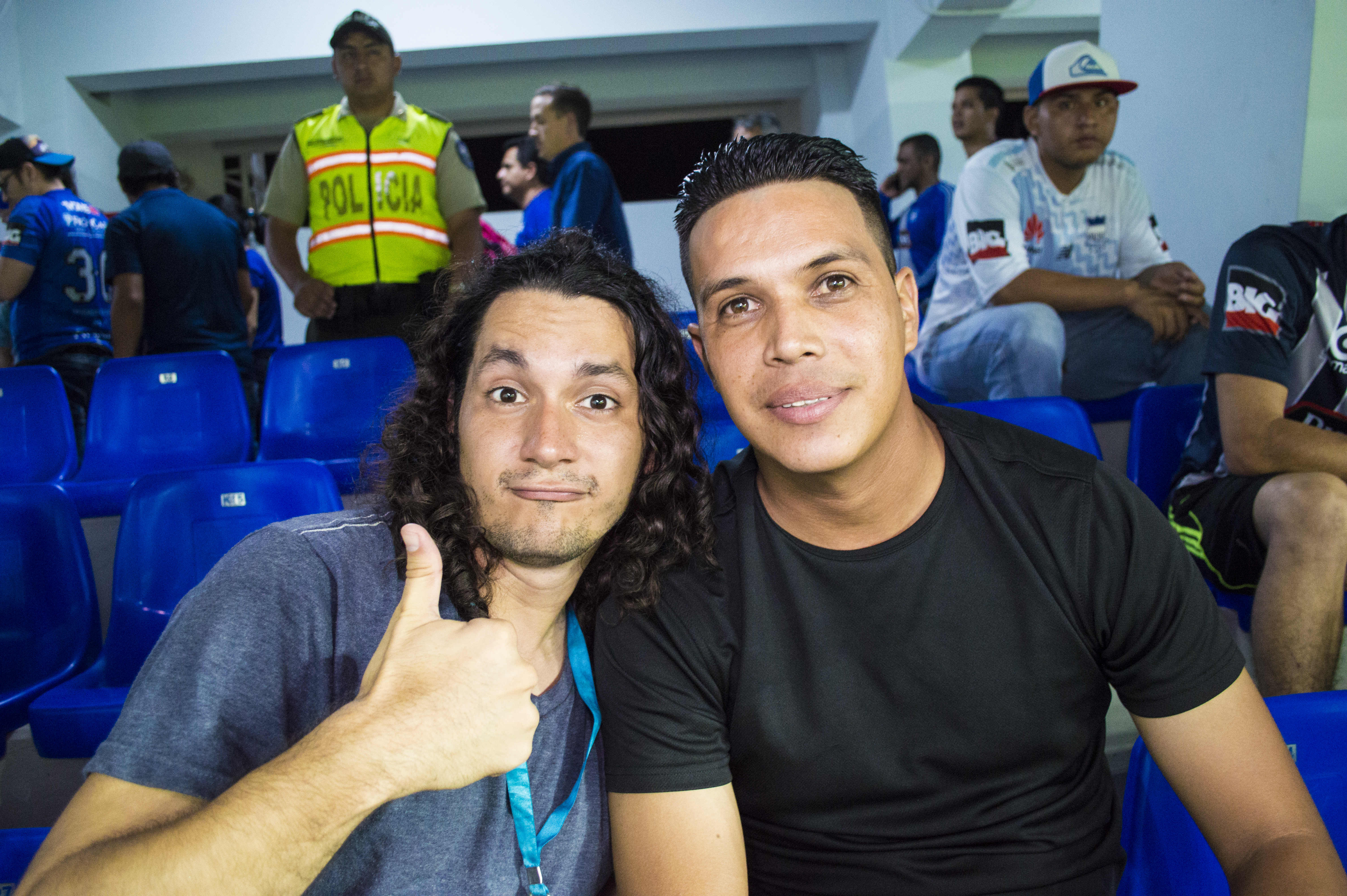 El Flaco Aguirre, fútbolista ecuatoriano, en 2017.